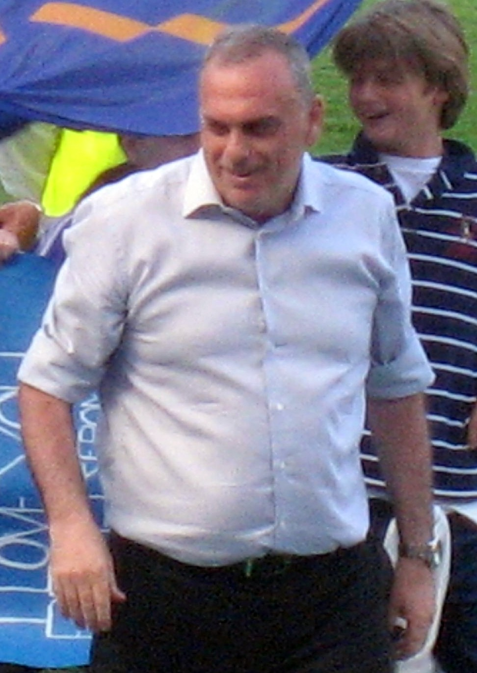 Avram Grant